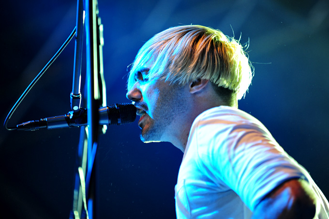 Sebastien Grainger Parklife Festival 2011